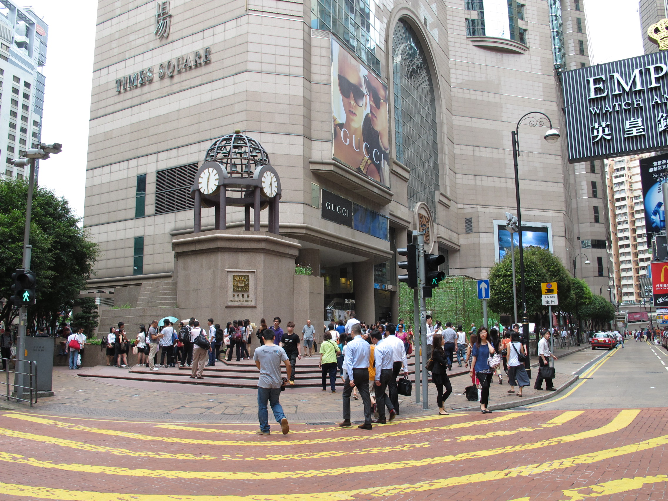 Times Square Plaza view